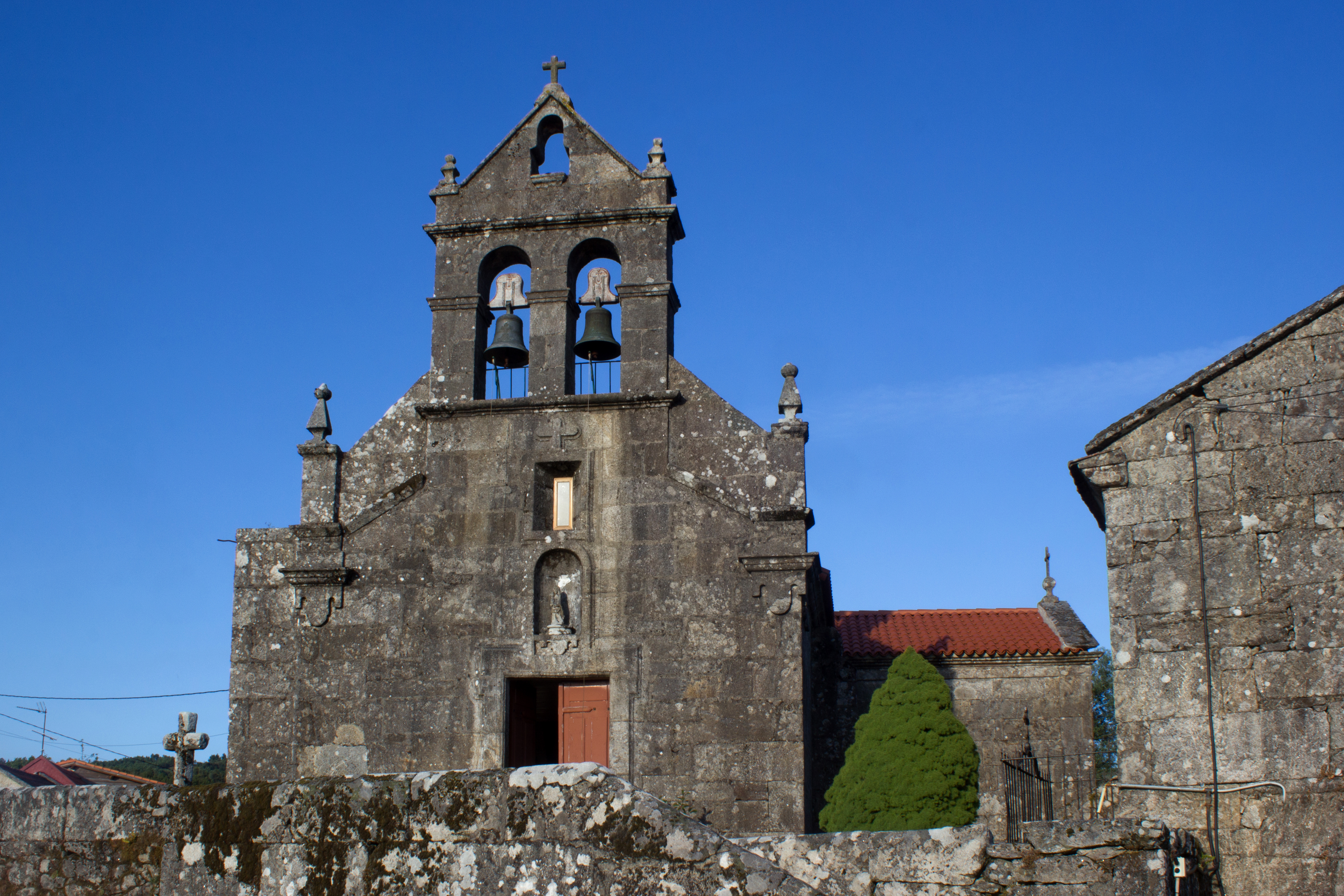 Igrexa de Santa María de Paraños no concello de Covelo.